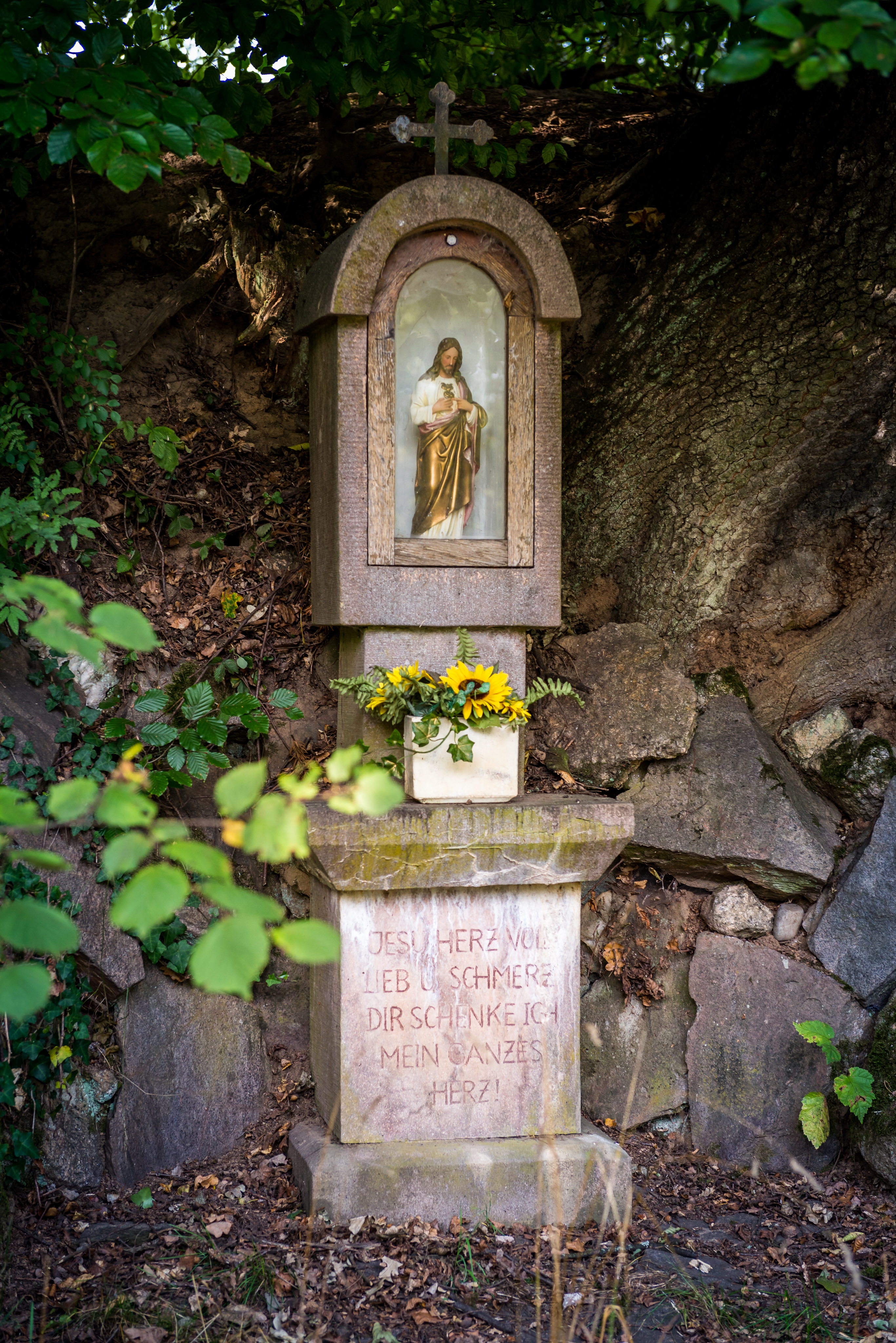 Nischenbildstock mit Herz-Jesu Figur "am Ried". Untersailauf am Weg Geisenbergstraße nach Rottenberg an der früheren Sandgrube. Feldaltar zum Gedenken an Frau Ottilie Müller, die hier 1942 beim Sandgraben tödlich verunglückte.This is a photograph of an architectural monument.